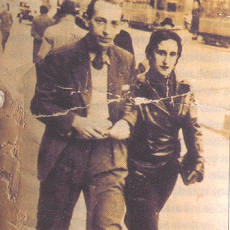 Syra Alonso e o pintor Francisco Miguel en Madrid en 1934